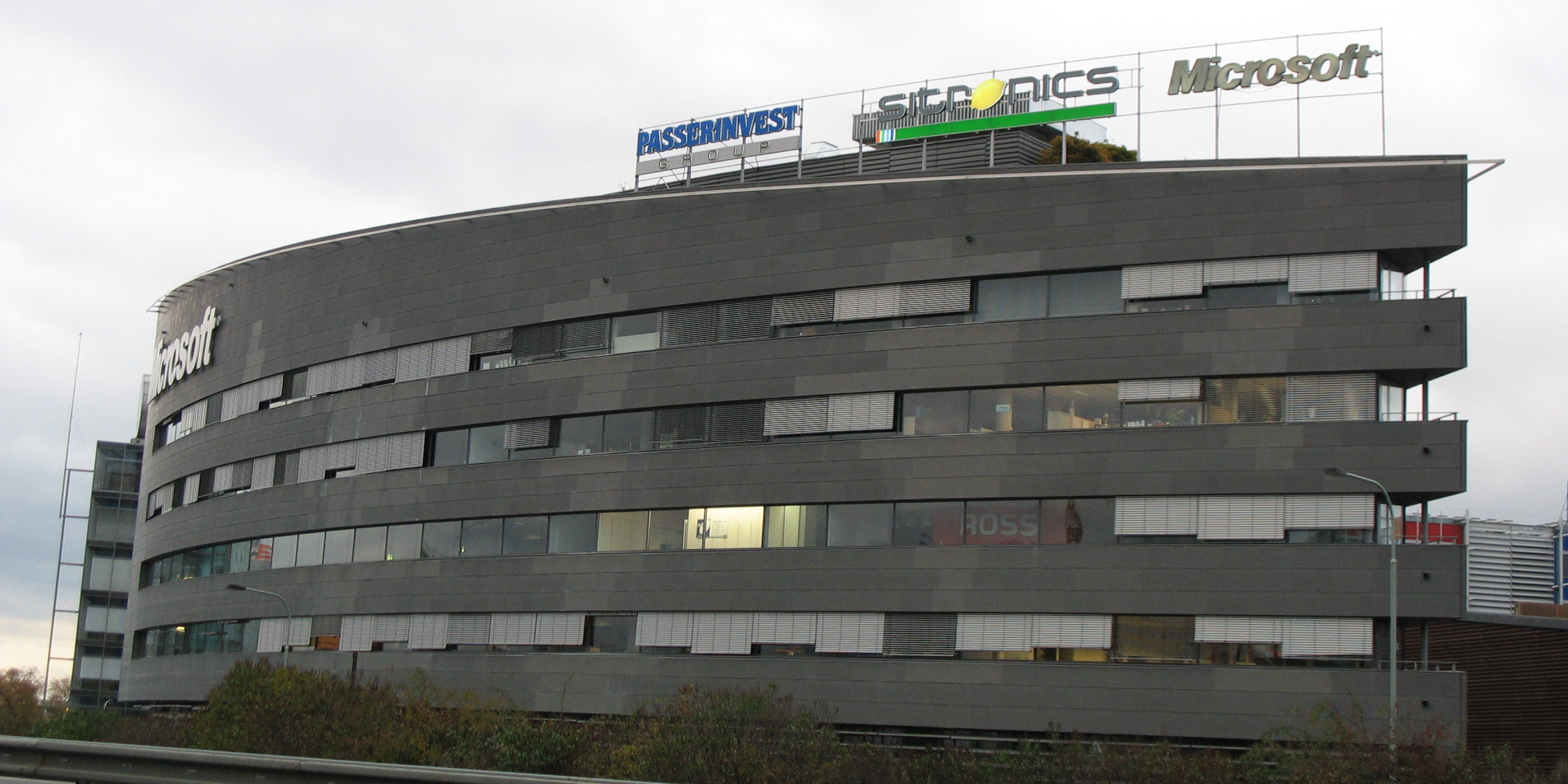 Czech Republic, Prague, BB Centrum - Alpha, Vyskočilova 1461/2a